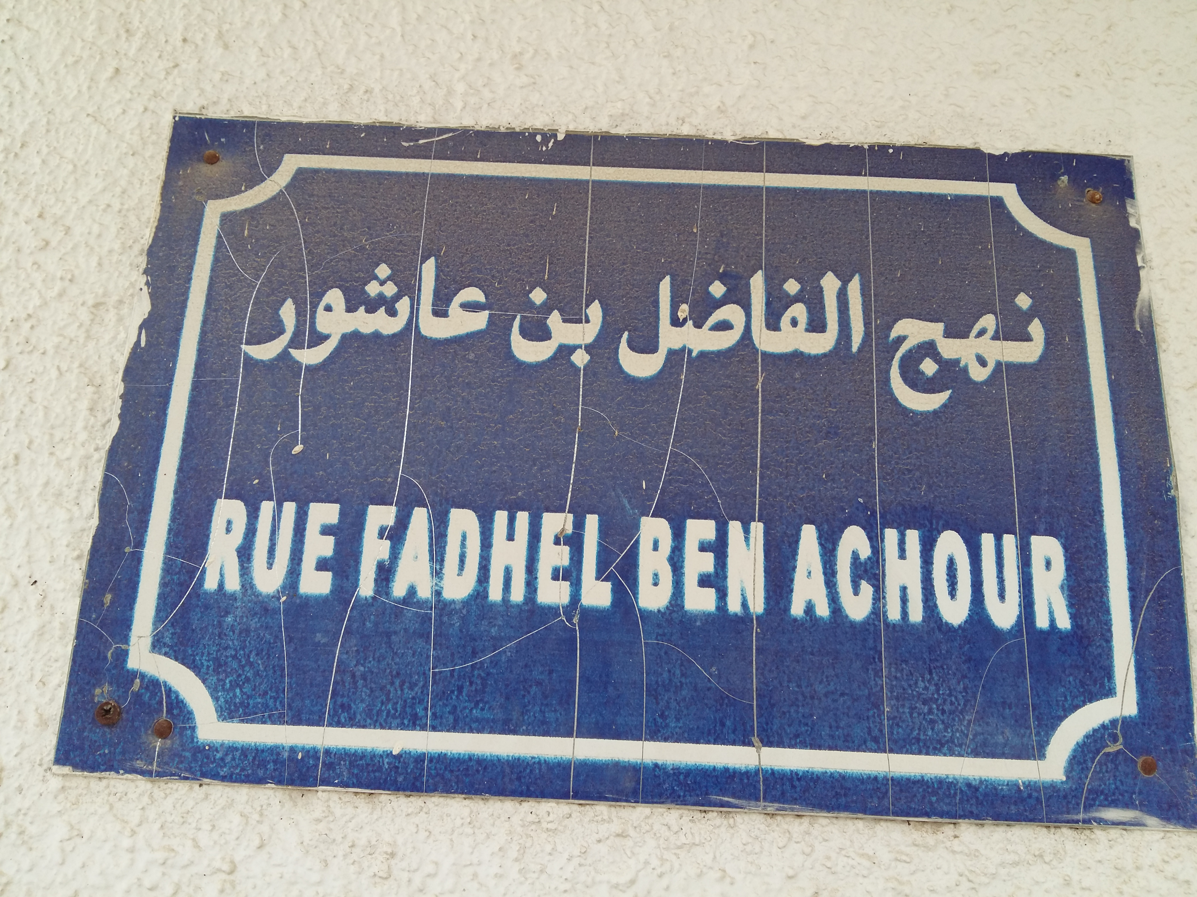 Rue Abdha ben Achour